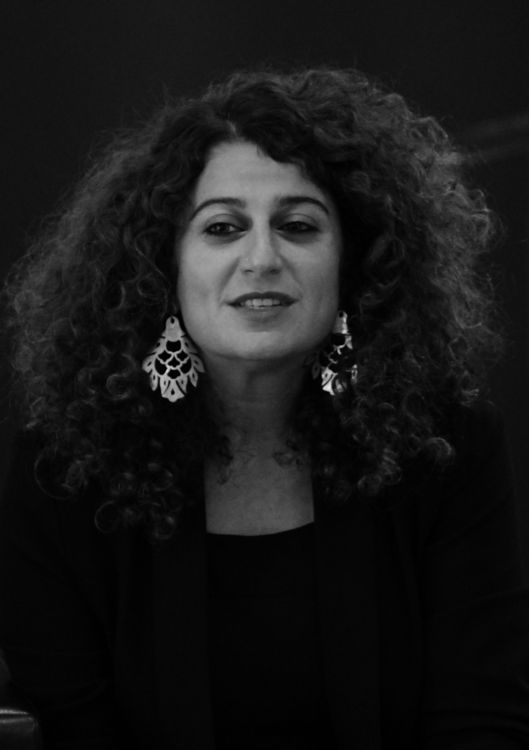 lors du festival Interbibli en la médiathèque Croix Rouge à Reims.